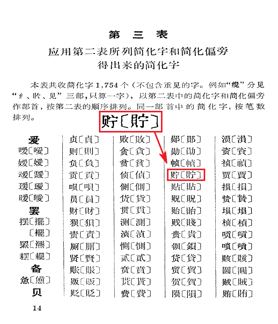 1964年版《簡化字總表》第三表中，「貯」字的簡化字标记为「⿰贝宁」。《簡化字總表檢字》1964年11月初版第一次印刷作「⿰贝宁」，1965年4月第二次印刷改為「贮」。書影取自中国文字改革委员会編 文字改革出版社出版 新华书店北京发行所发行 全国新华书店经售 京华印书局印刷 新街口装订厂装订 《简化字化字总表》 统一书号9060·490 1964年5月第1版 1964年5月第一次印刷。原书属于具有“法律、法规、国家机关的决议、决定、命令和其他具有立法、行政,司法性质的文件”。「⿰贝宁」